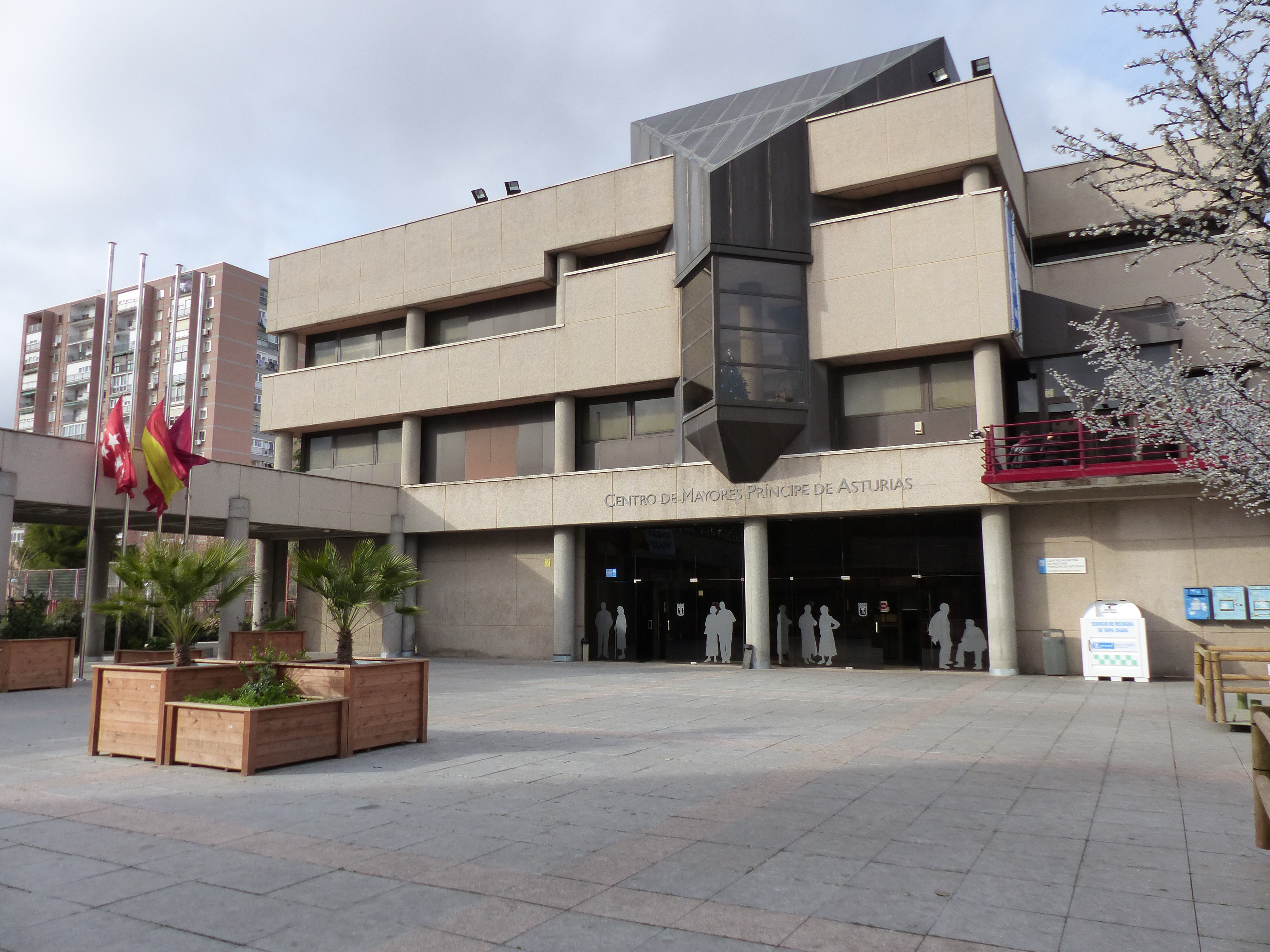 Pueblo Nuevo, tercera edad